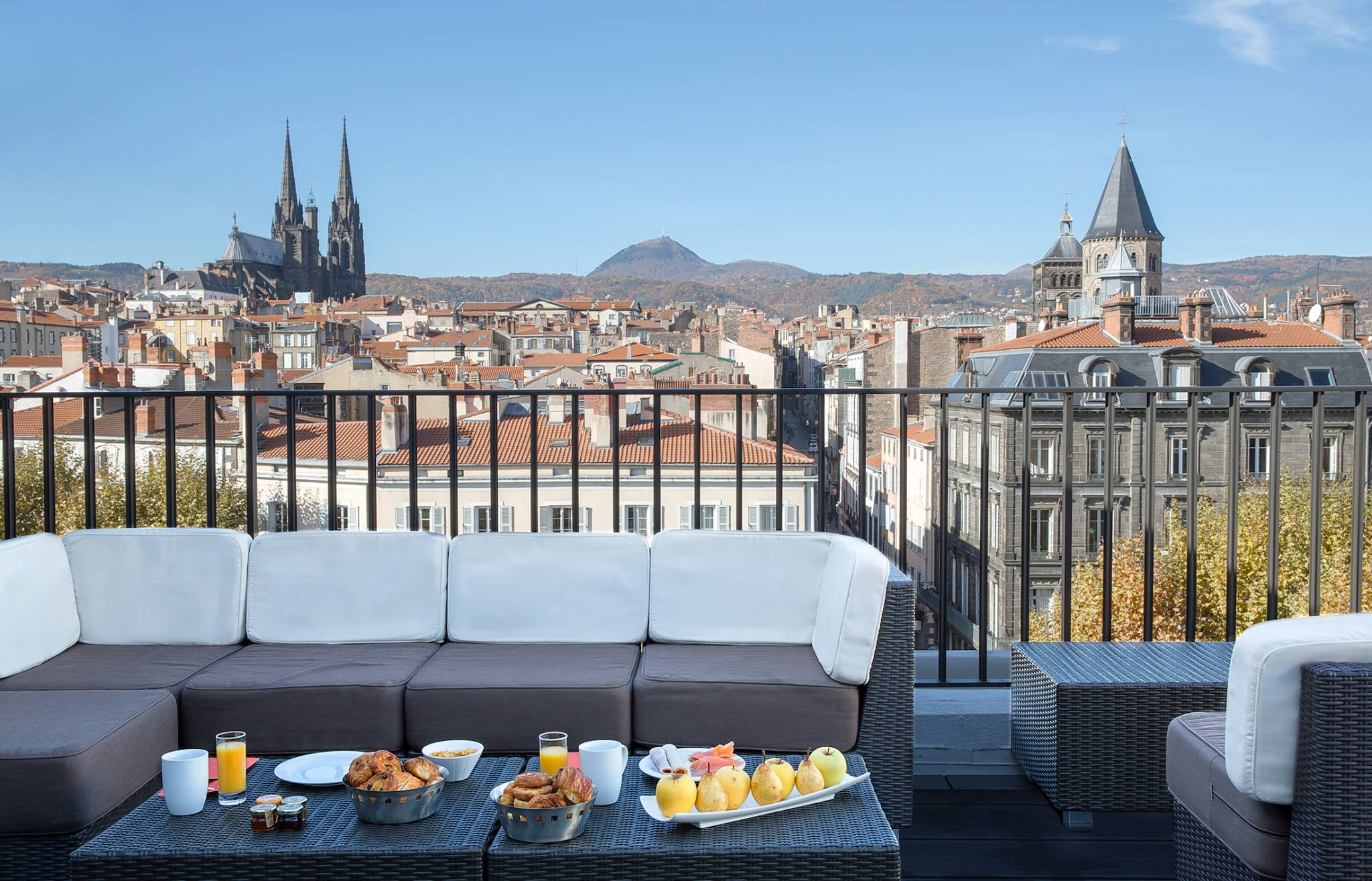 Terrasse de l'hôtel avec vue sur Clermont-Ferrand et le puy de Dôme